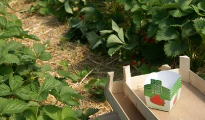 Fraisiers, en plein champs, en production